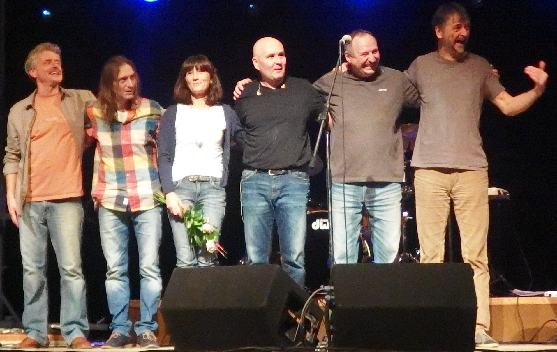 AG Flek, zlínská folkrocková hudební skupina, založená v roce 1977.